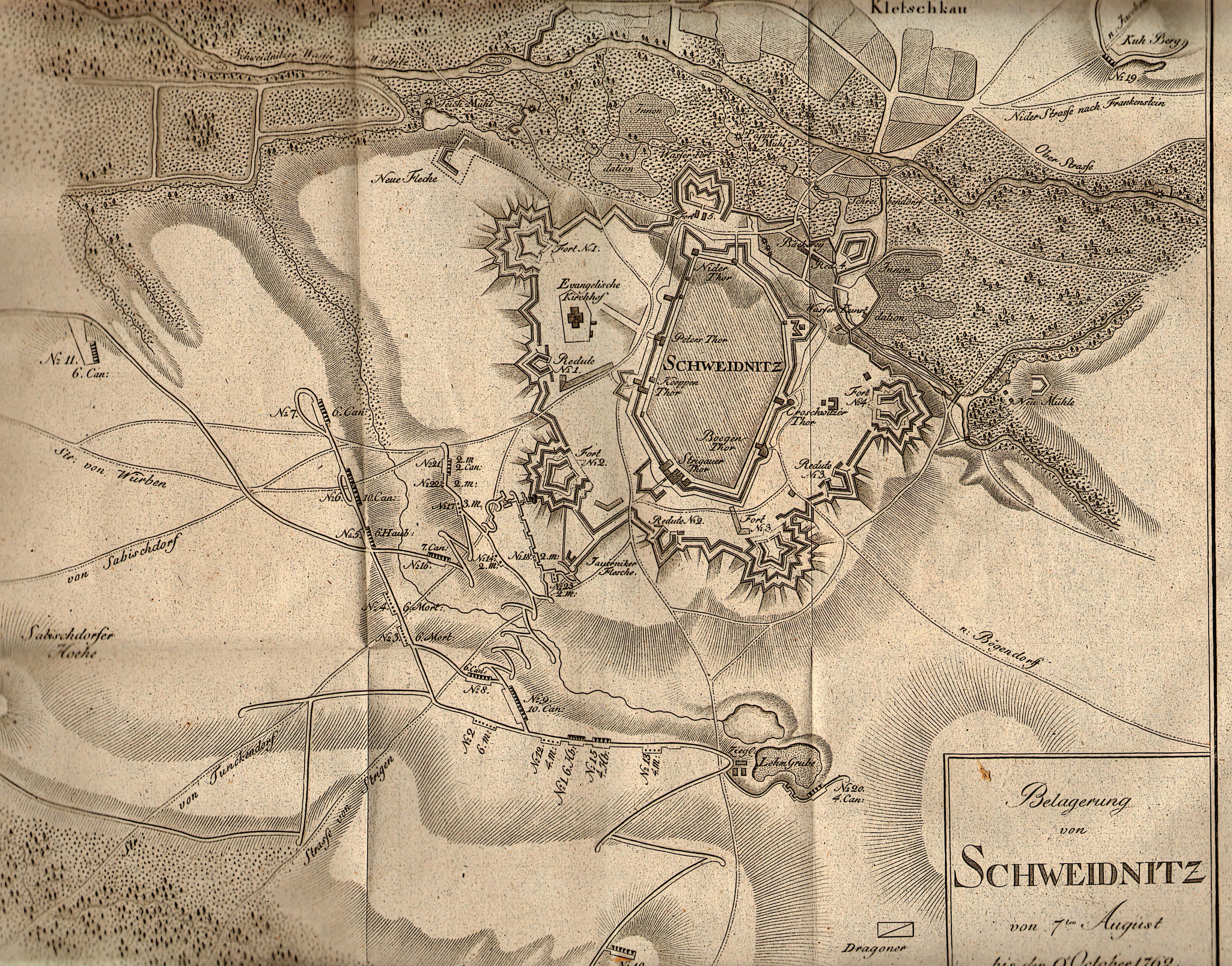 Karte zur Belagerung von Schweidnitz 1762